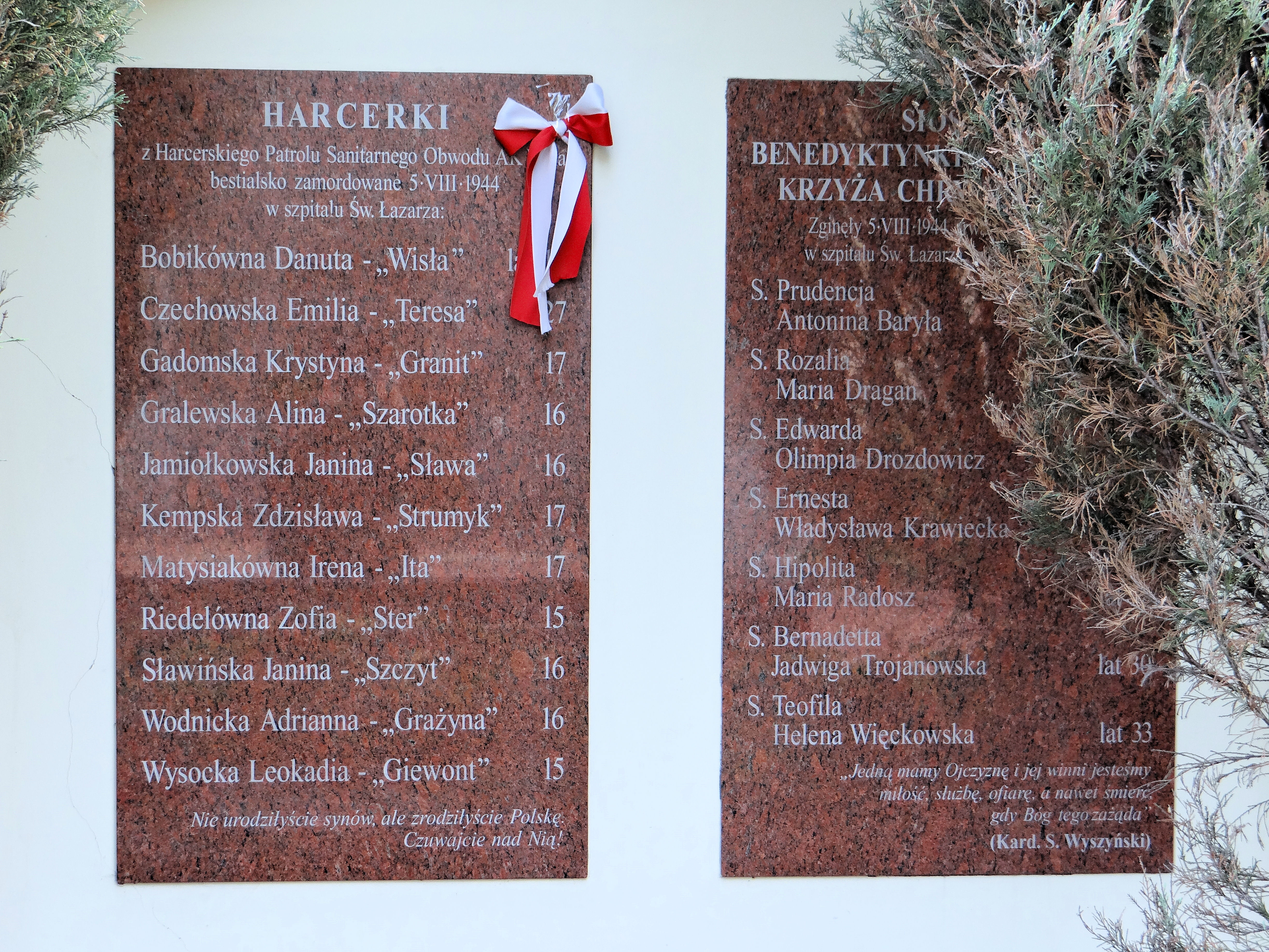 Kościół pod wezwaniem św Klemensa Hofbauera w Warszawie na Woli, przy ul. Karolkowej 49 - plac pamięci - tablice upamiętniająca ofiary II Wojny światowej. Tablica lewa upamietnia dzieci cierpiace w obozach koncentracyjnych, tablica prawa najmłodszych żołnierzy AK - harcerzy i harcerki Szarych Szeregów.